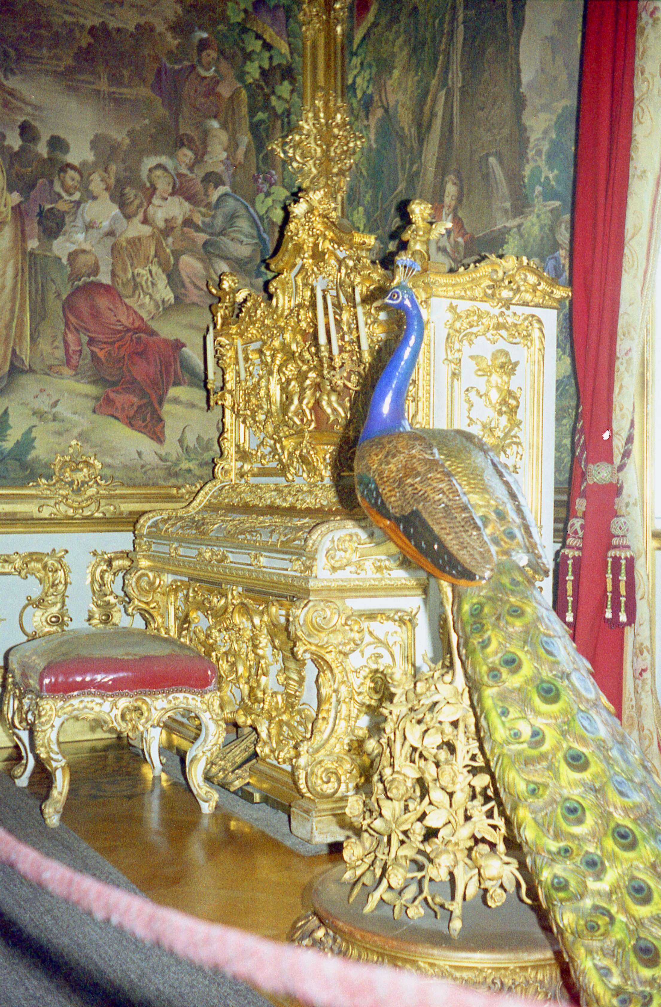 Schloss Linderhof, Pfau